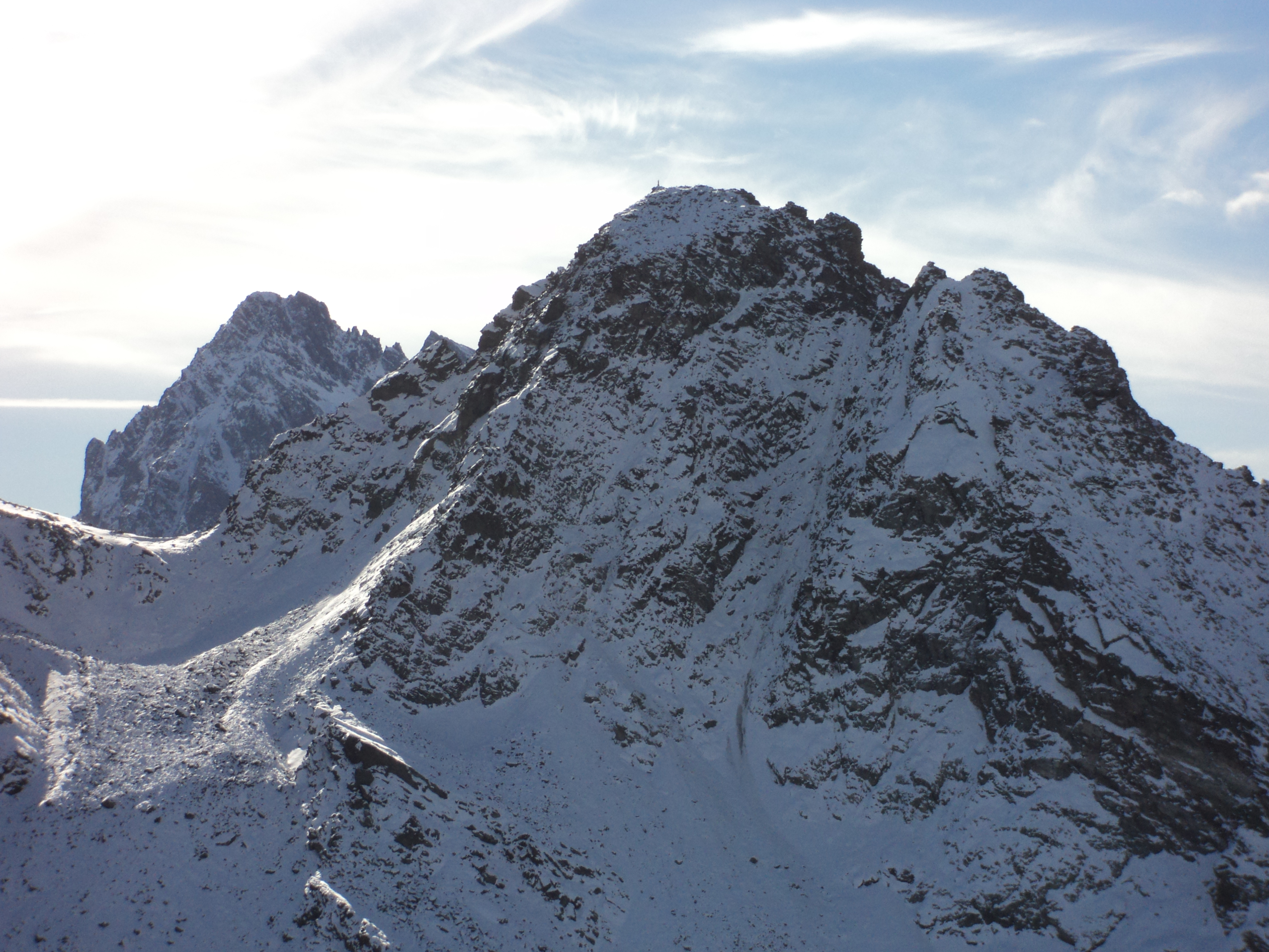 Il monte Granero visto dal Monte Monzol - Alpi Cozie